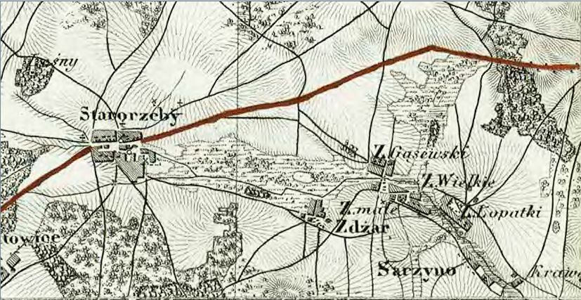 Staroźreby i Zdziary na mapie topograficznej Królestwa Polskiego z 1839 r.